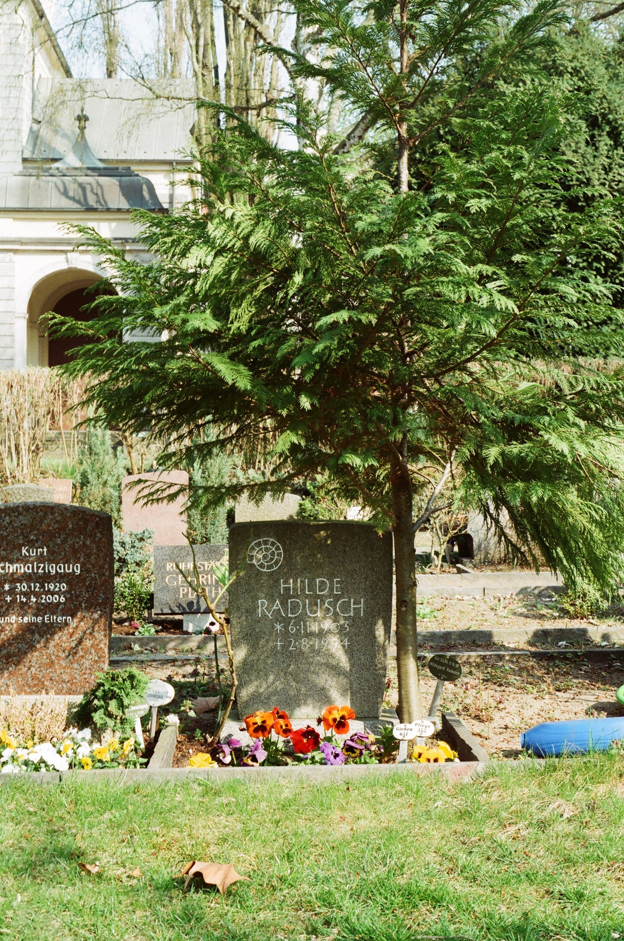 Grab von Hilde Radusch auf dem Alten St. Matthäus Kirchhof, Foto Wolfgang Schindler